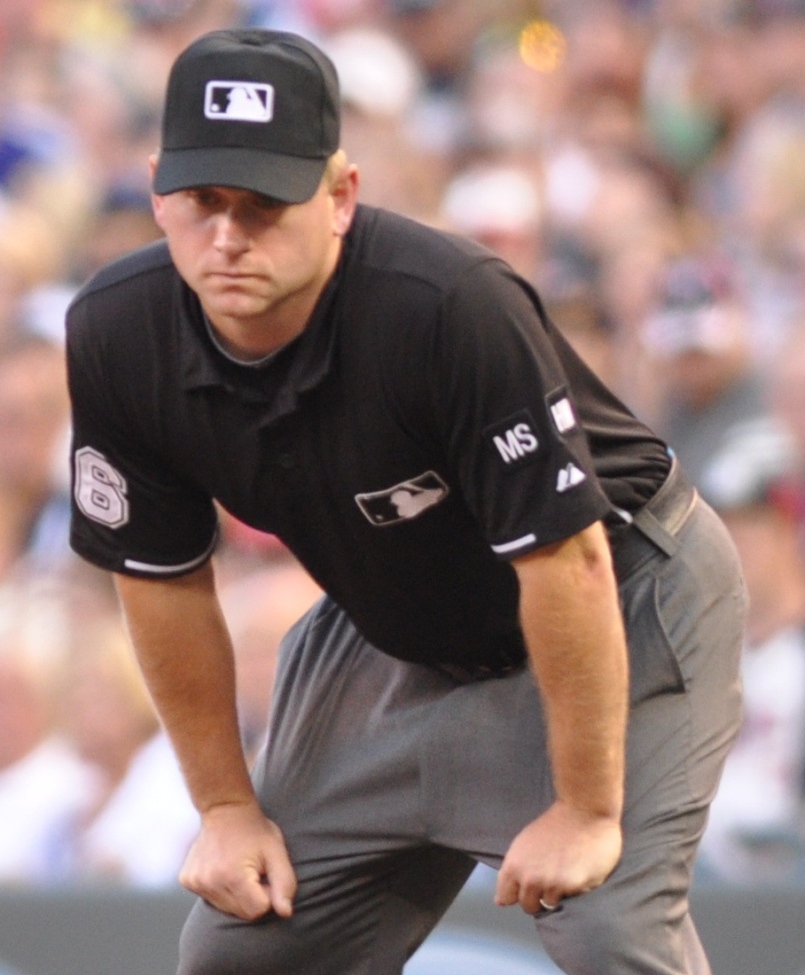 MLB umpire Mike Muchlinski